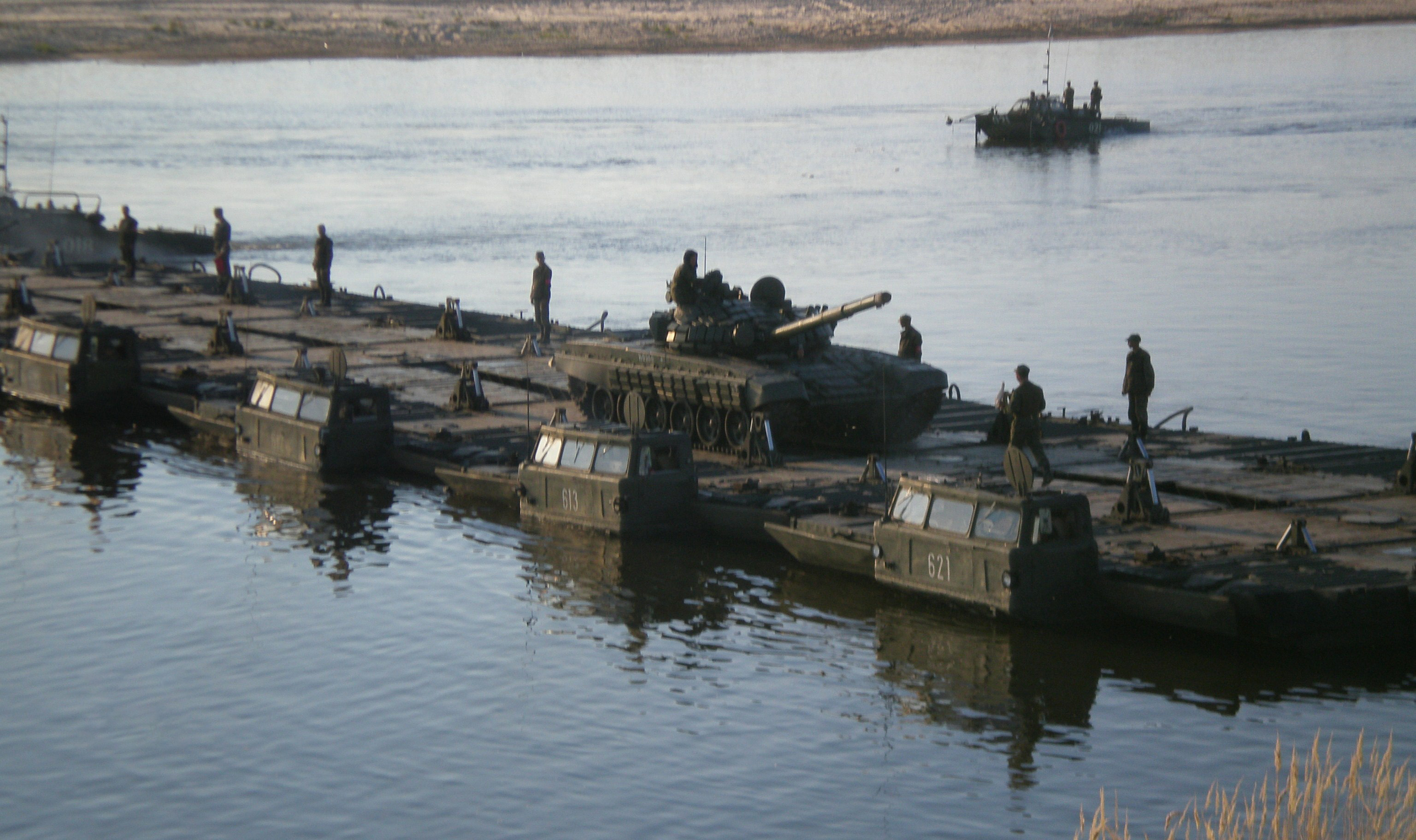 СПП самоходный понтонный парк